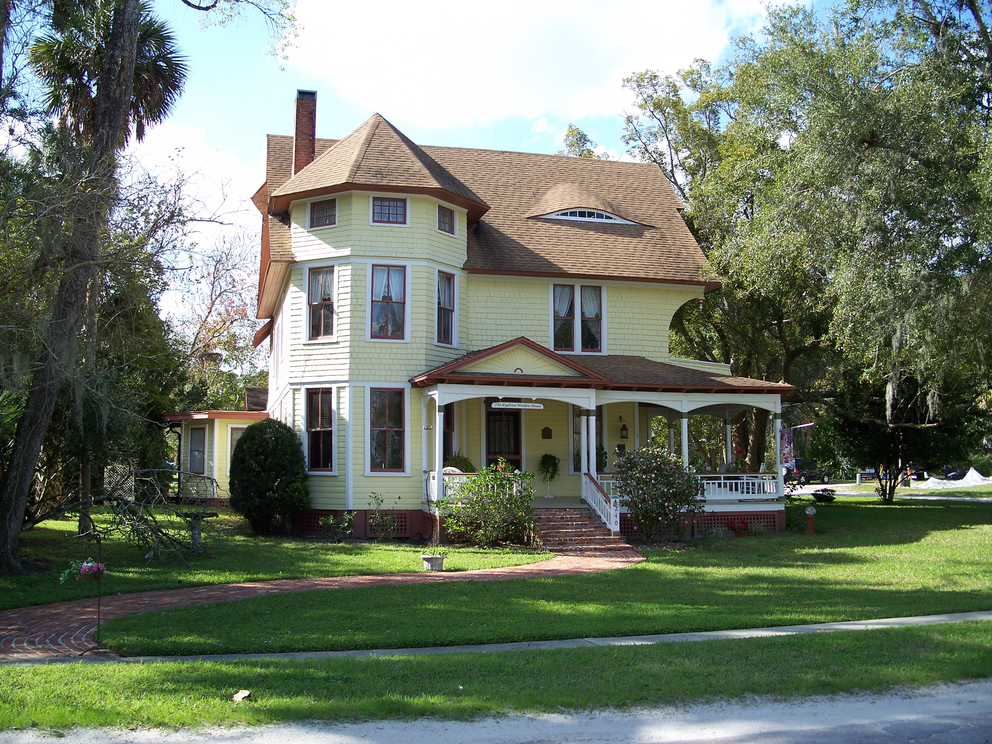 House in Lake Helen Historic District, in Lake Helen, Florida